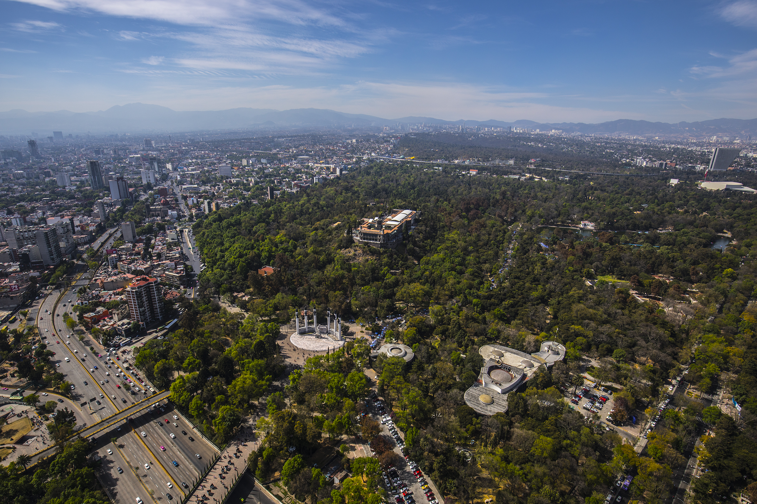 Fotografías de la Ciudad de México desde el aire.